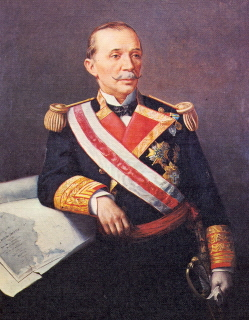 Retrato del vicealmirante español Juan Bautista Antequera y Bobadilla (1823-1890), que llegó a ser ministro de Marina en tres ocasiones.